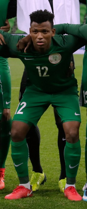 Nigeria national football team